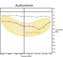 Audiometrie mit Schallleitungsschwerhörigkeit